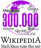 Logo mừng 300,000 bài viết của Wikipedia tiếng Việt, vẽ lại từ logo Wikipedia tiếng Việt gốc.